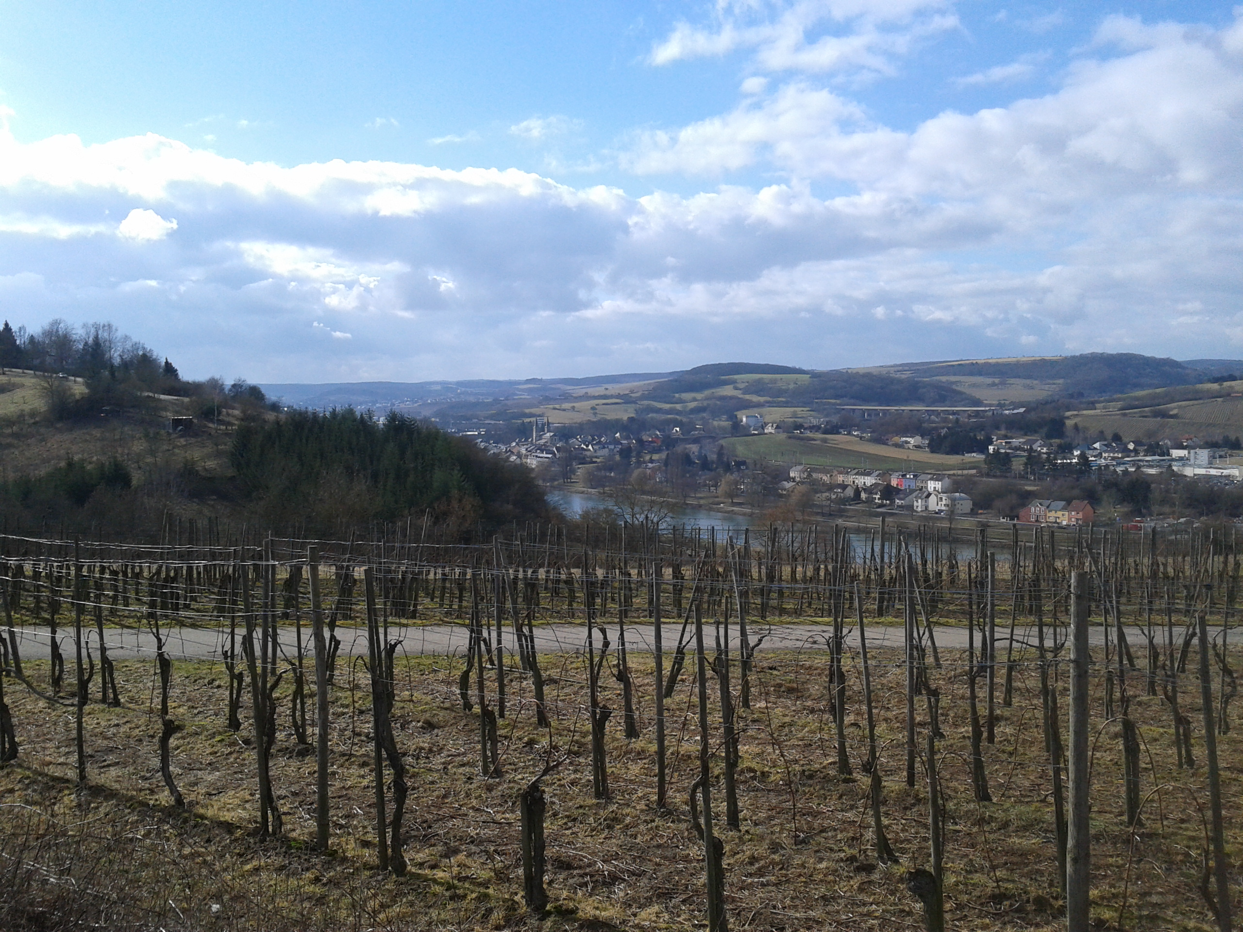 Weinberge